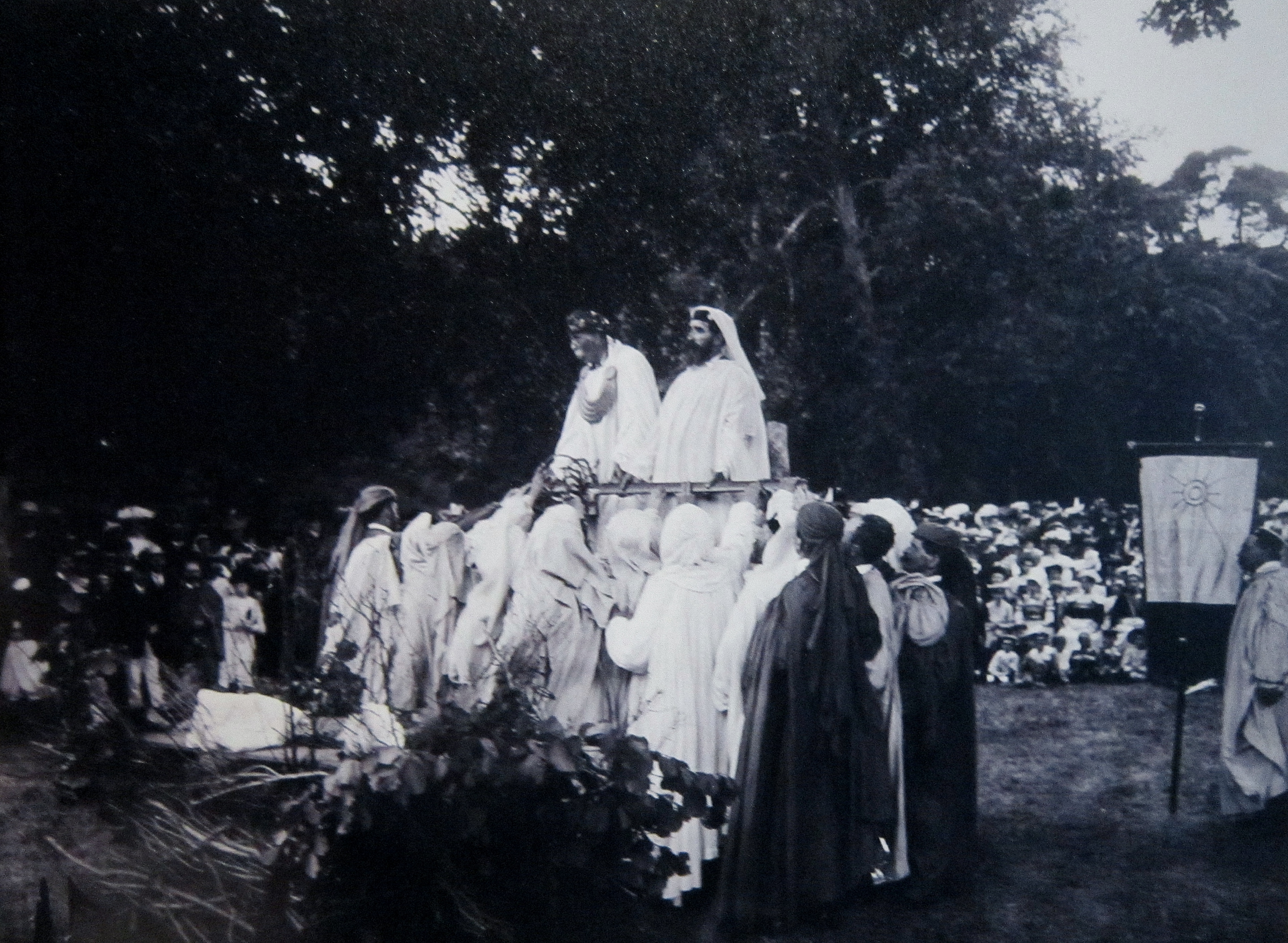 Rassemblement de druides à Saint-Brieuc en 1906 (photographie, auteur anonyme, Musée de Bretagne, Rennes).